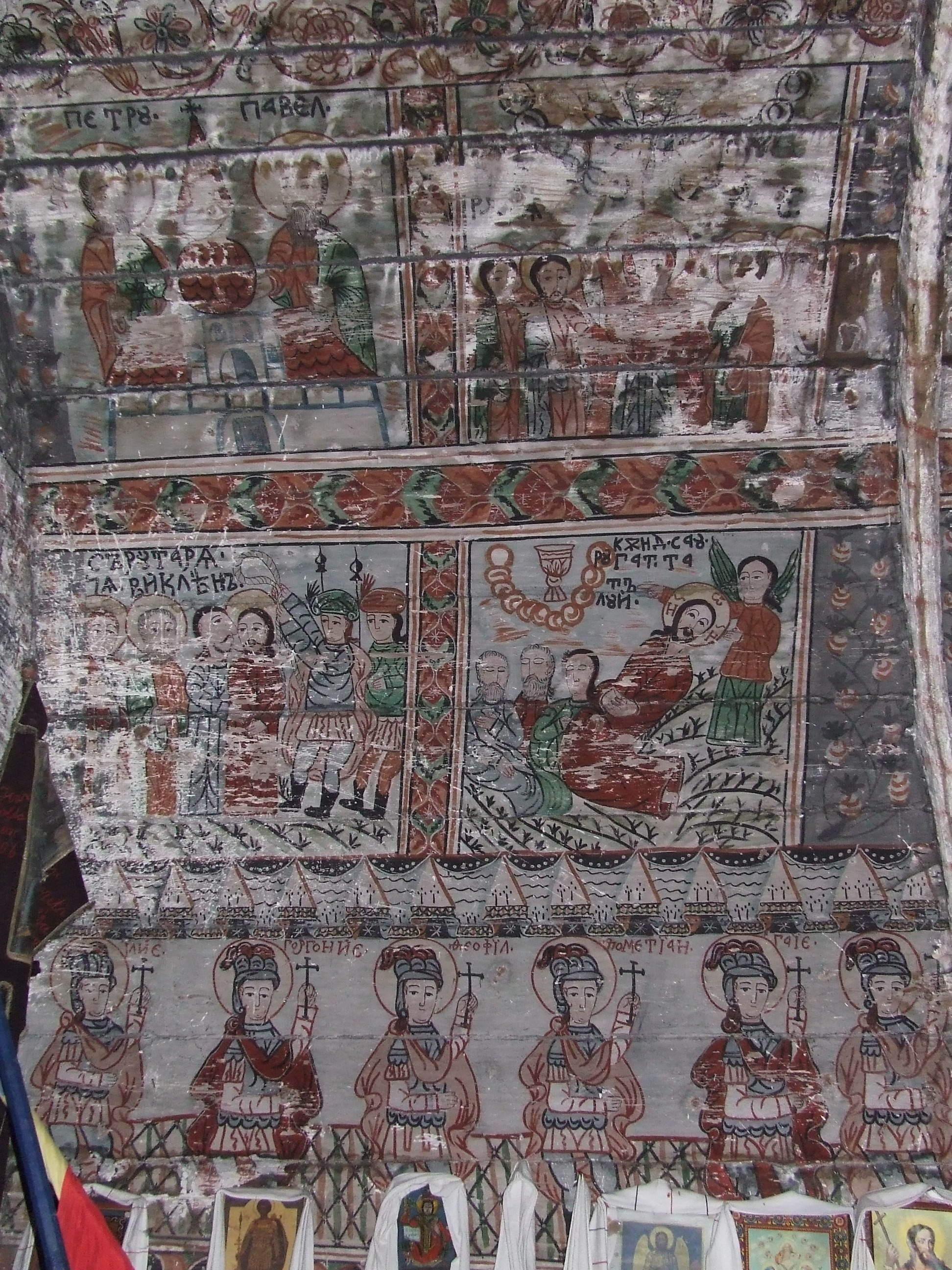 Biserica de lemn din Dângău Mic